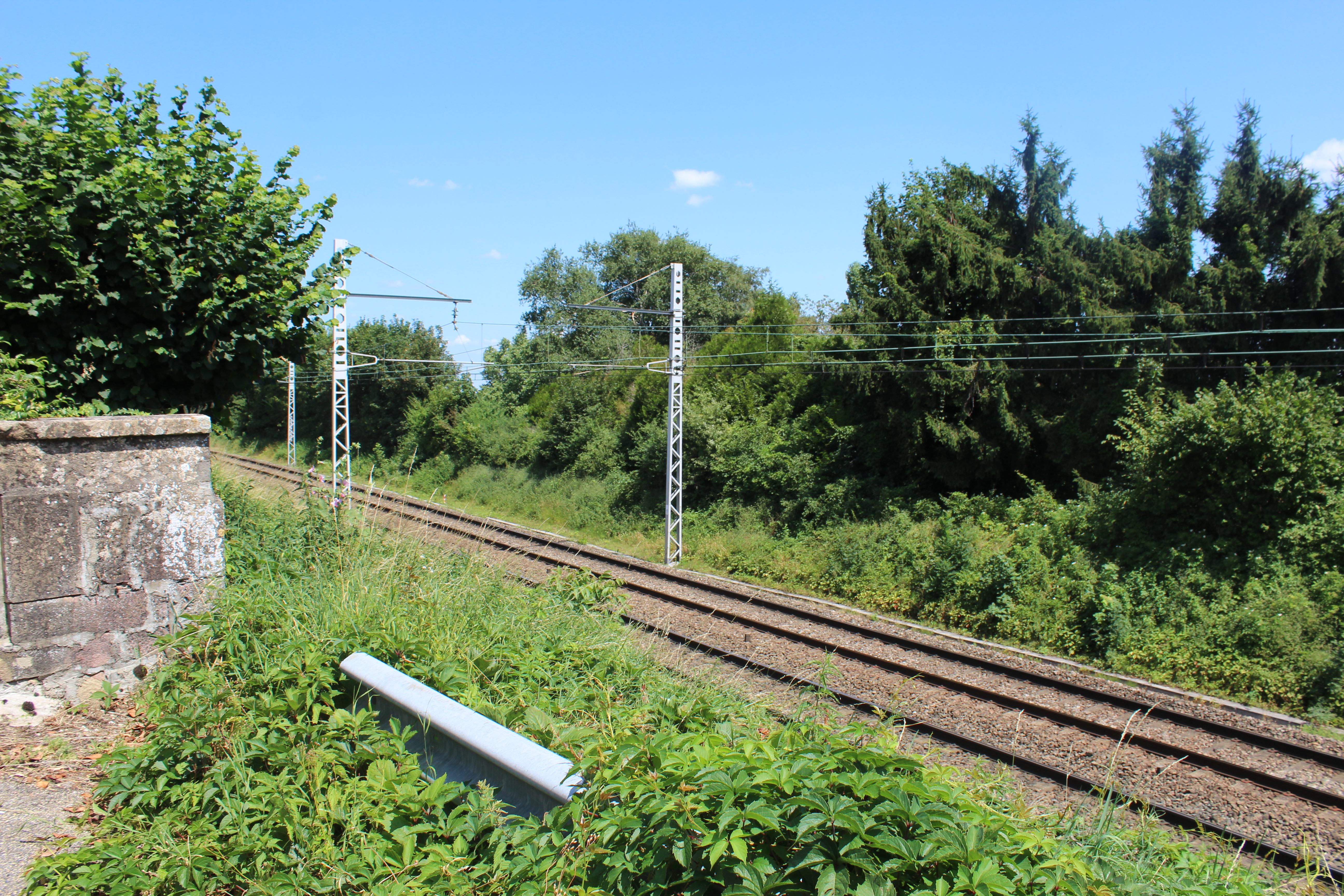 La voie ferrée de la ligne PLM à Saint-Jean-le-Priche.